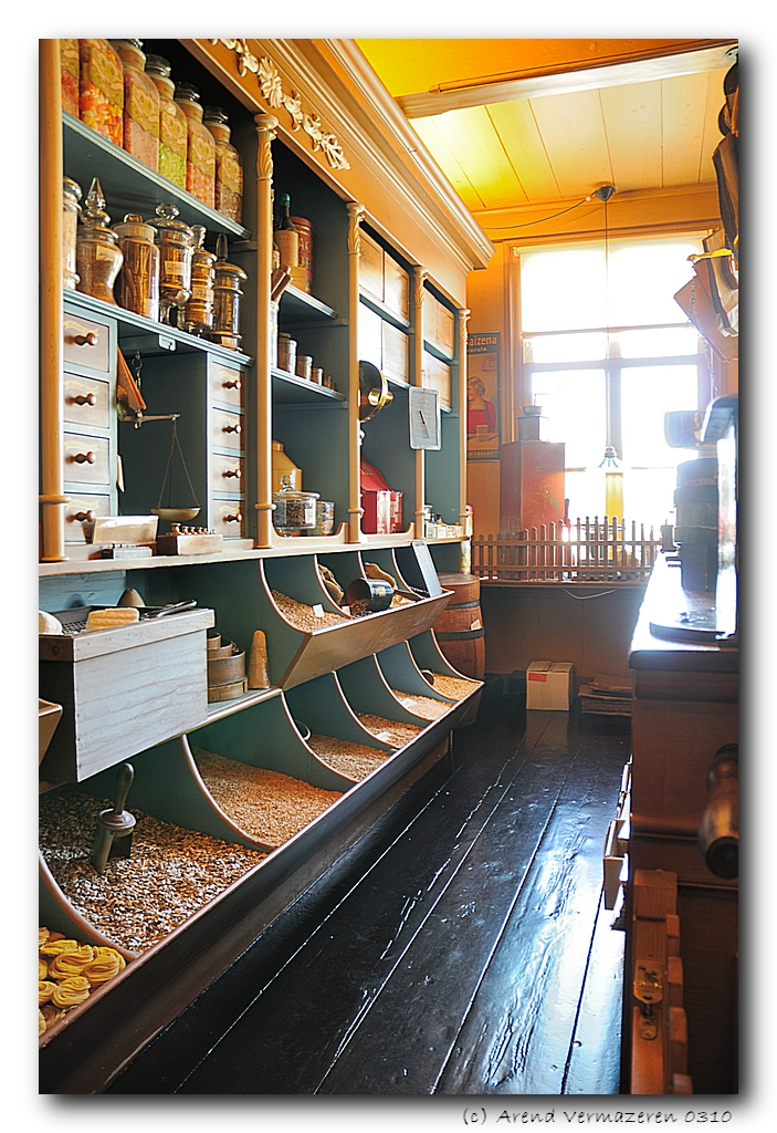 First grocery Albert Heijn